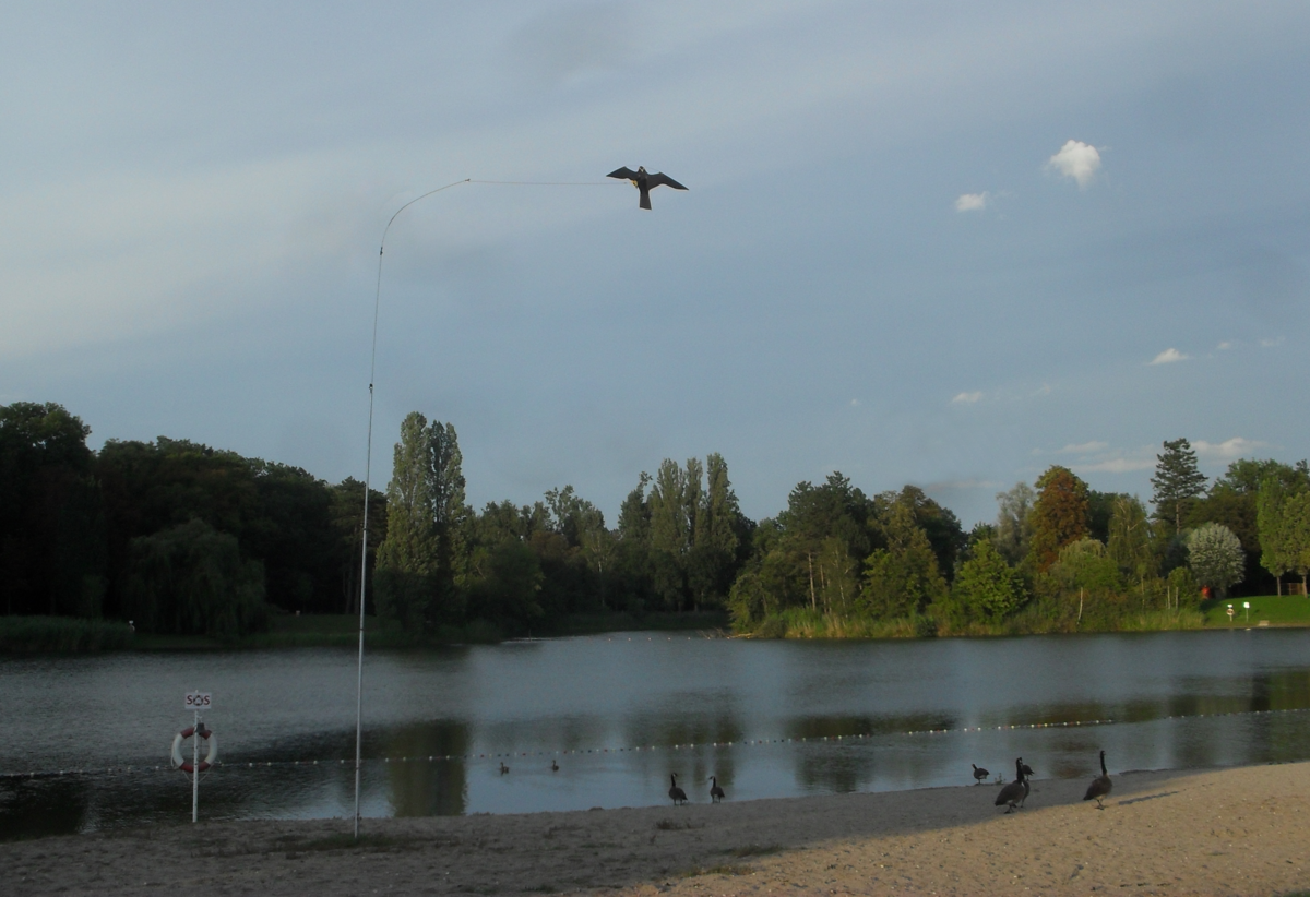 Eine Attrappe eines Raubvogels soll bei Wildgänsen Fluchtverhalten auslösen und sie so von einem Badestrand fernhalten. Infolge von Habituation reagieren sie darauf nicht mehr.